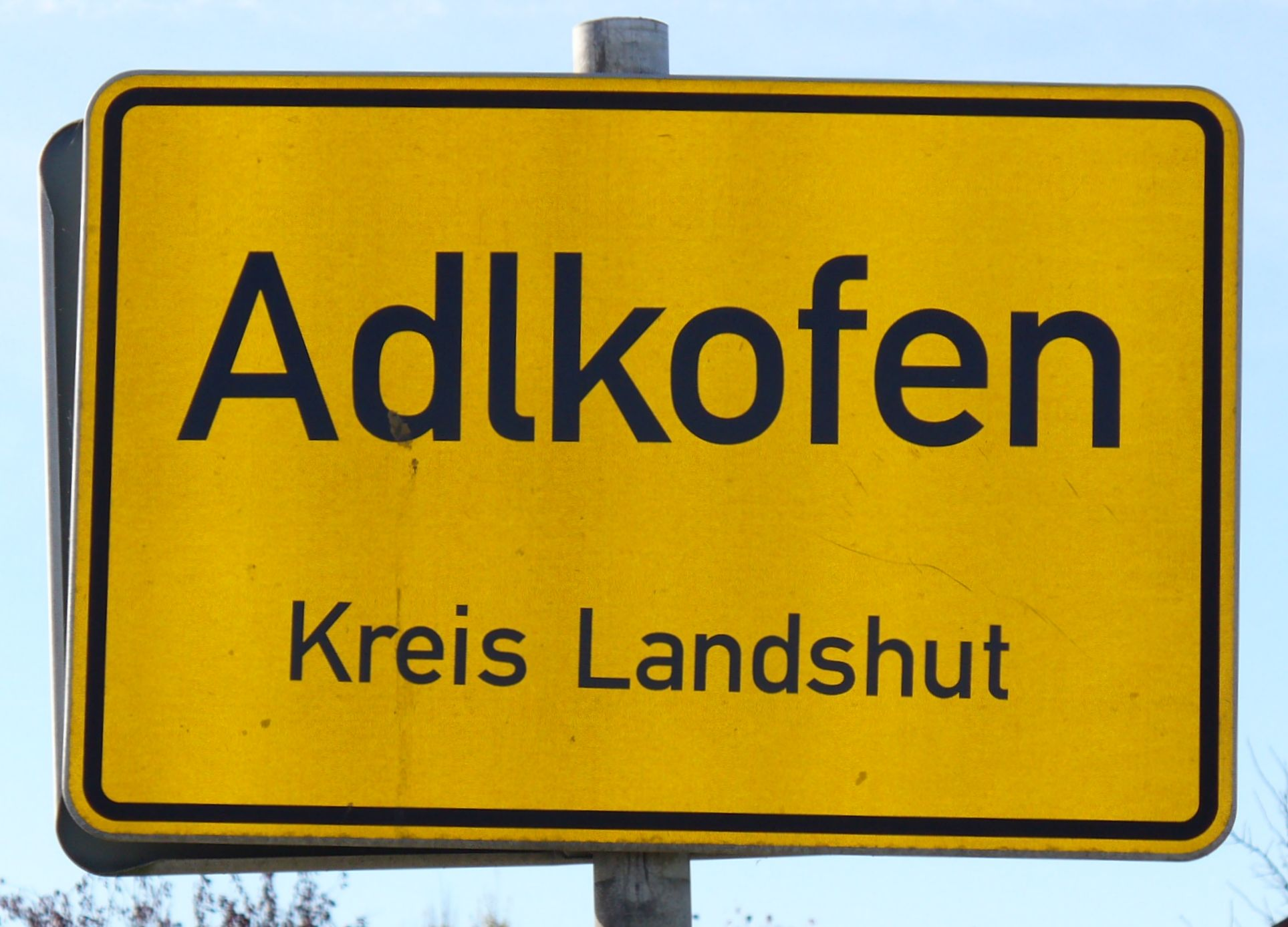 Ortsschild Adlkofen (von Blumberg kommend)